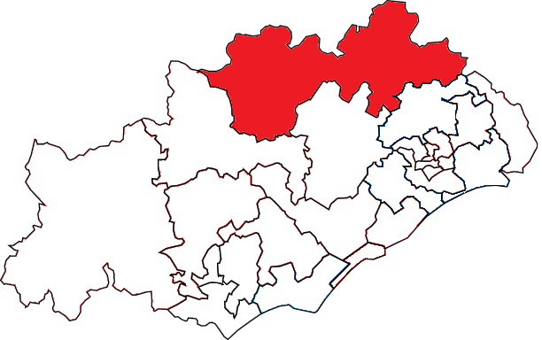 Situation du canton dans le département de l'Hérault